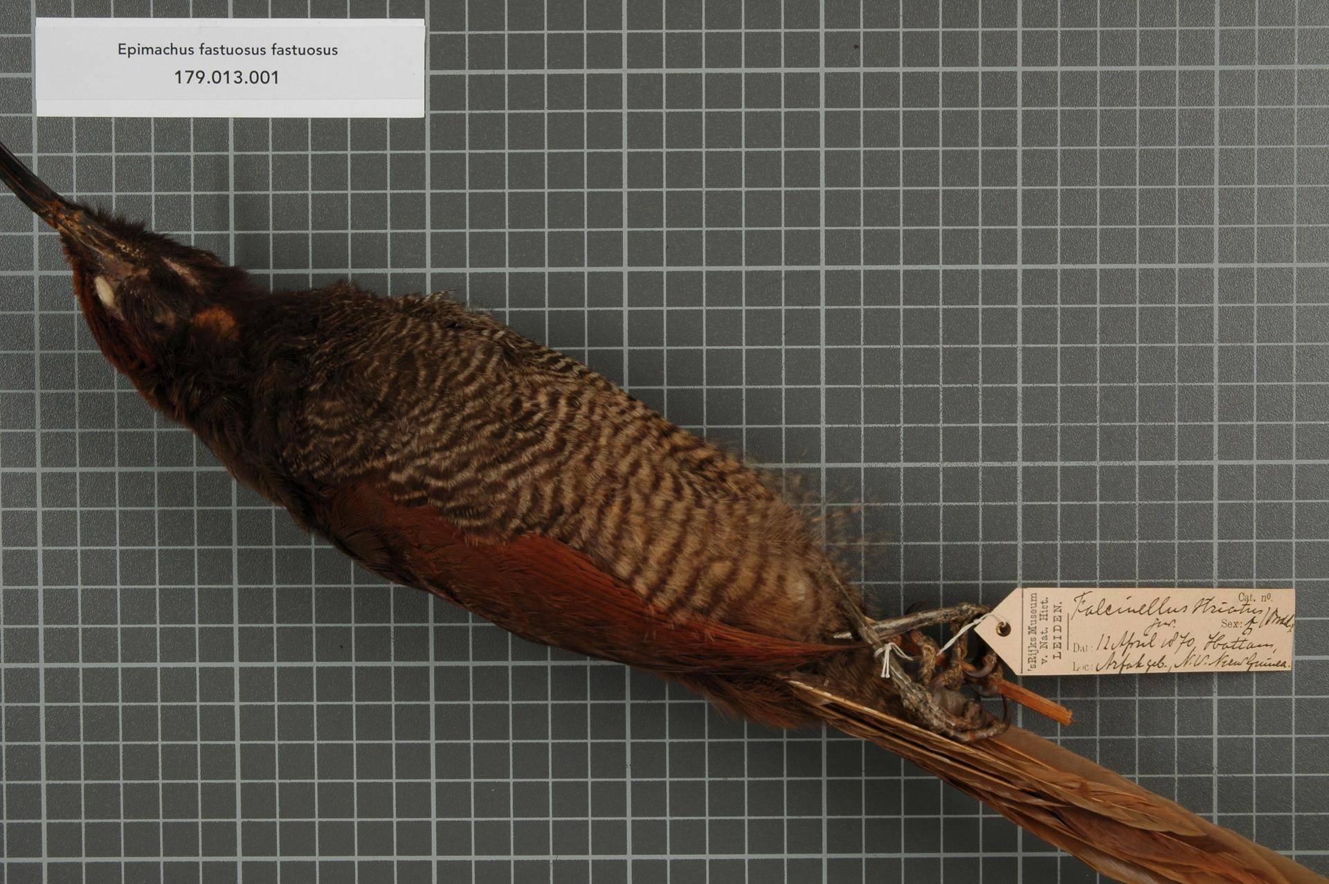 Epimachus fastuosus fastuosus (Hermann, 1783)